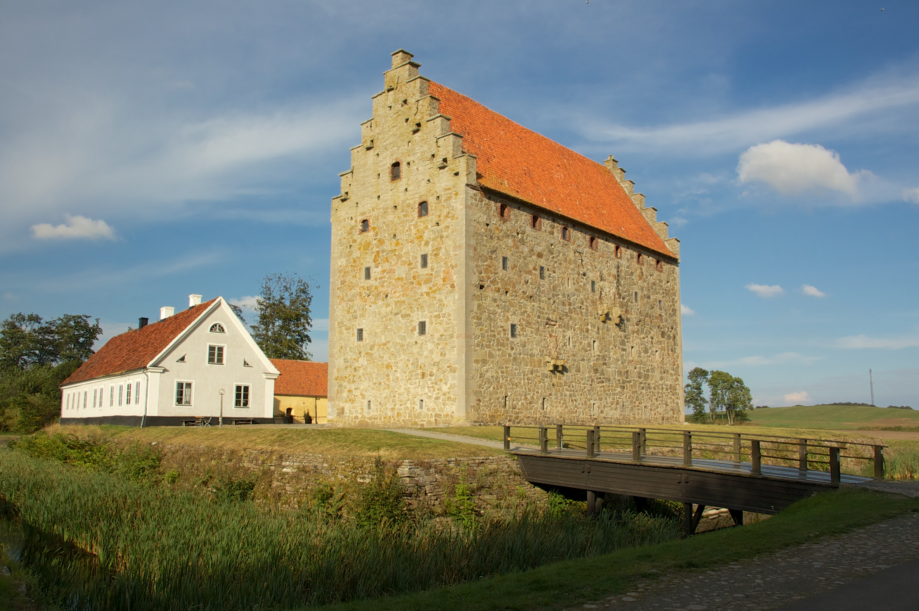 Glimmingehus